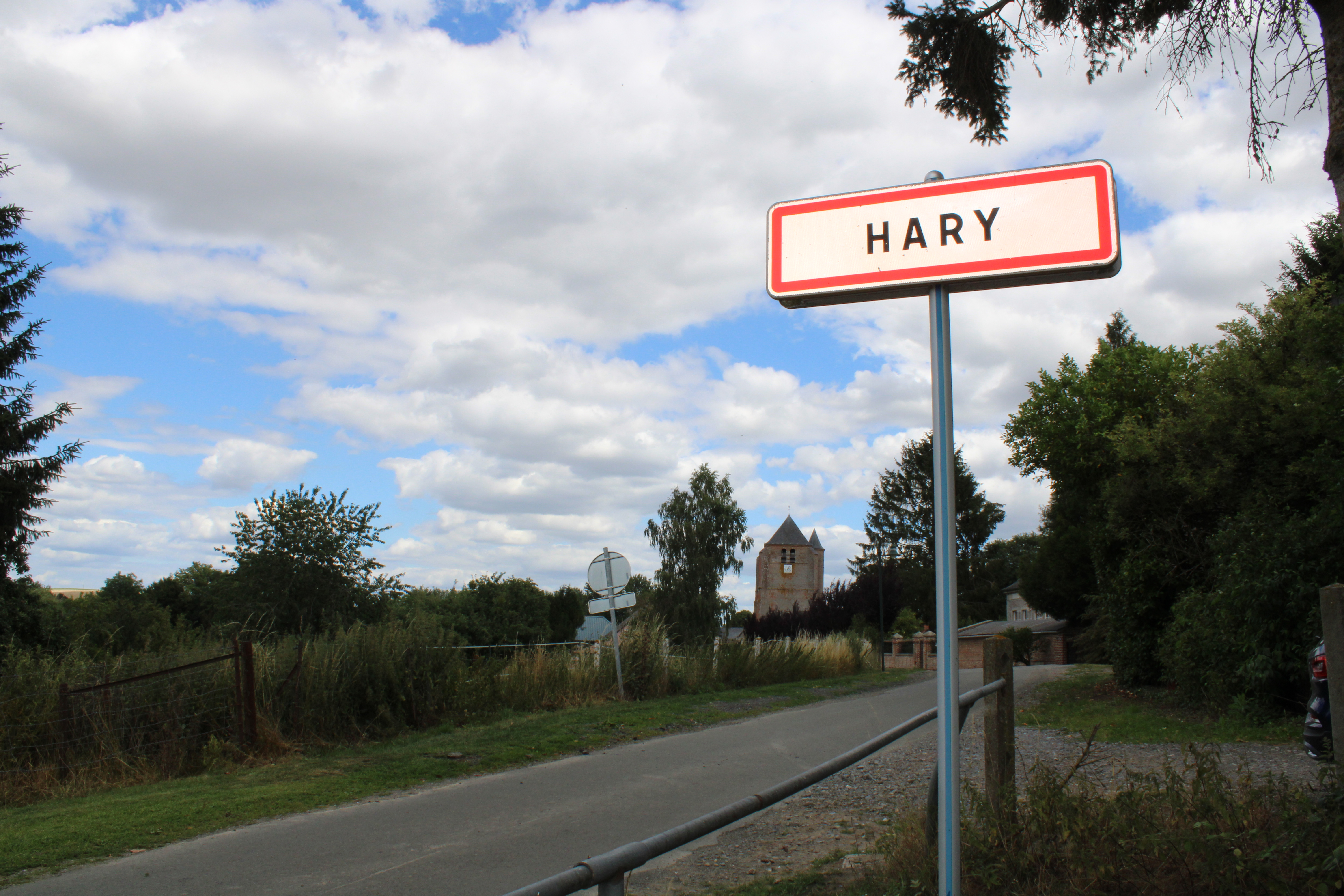 Entrée du village